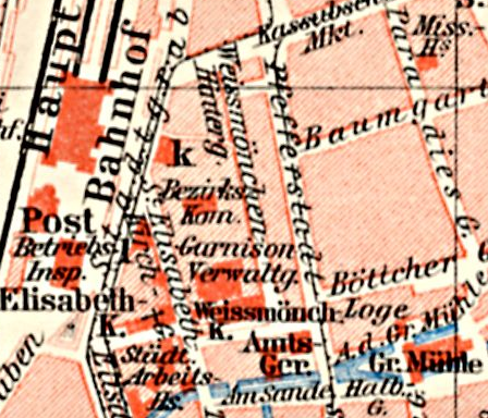 Umgebung der in der Karte als Weißmönchen-Kirche benannten Josephskirche in der Danziger Altstadt. Ausschnitt aus dem Plan von Danzig in Meyers Konversations-Lexikon, 6. Ausgabe von 1905.